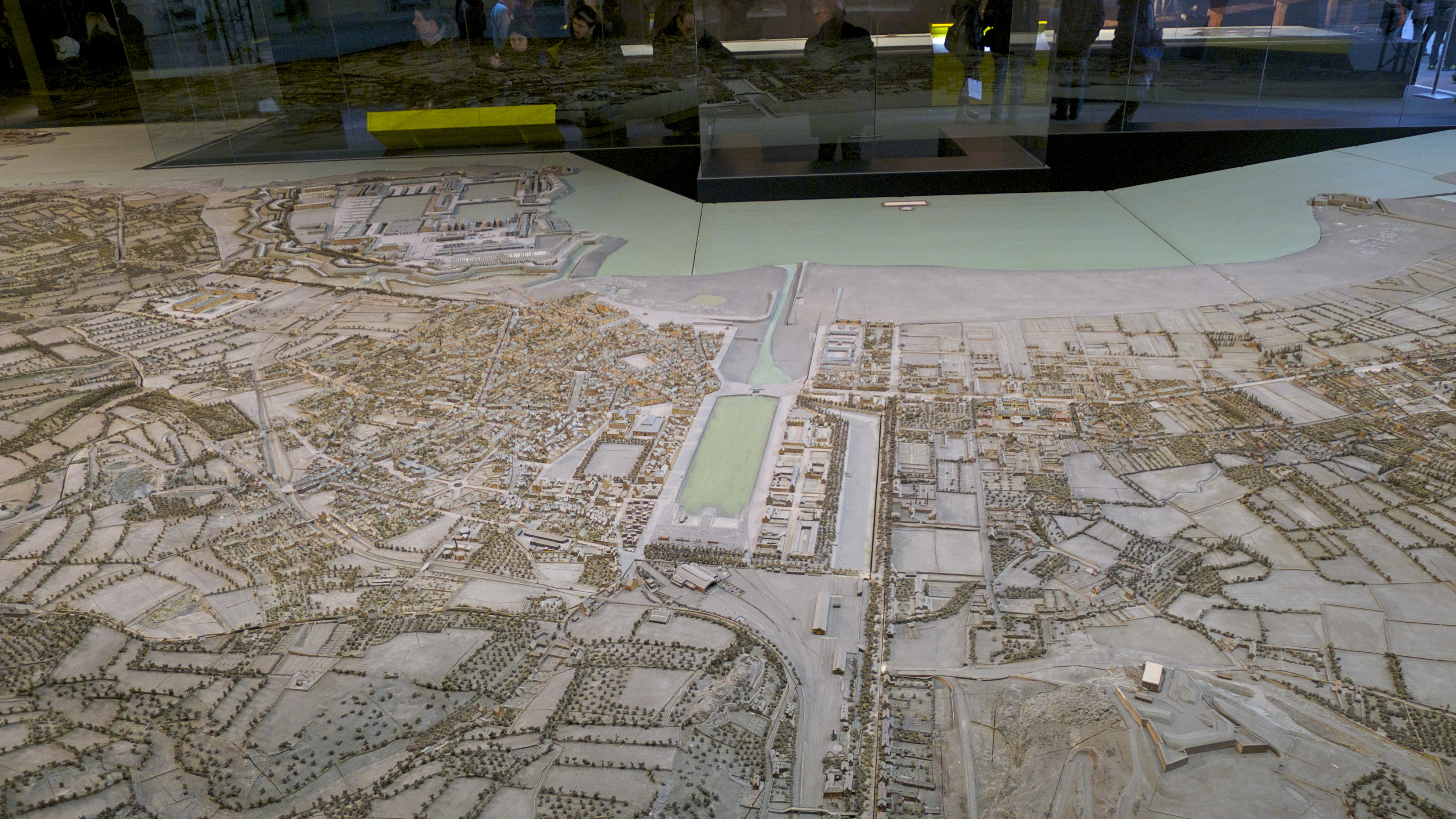 Plan-relief du port de Cherbourg dans son état de 1872. Plan-relief construit de 1813 à 1819 et actualisé de 1863 à 1872. Échelle 1/600e